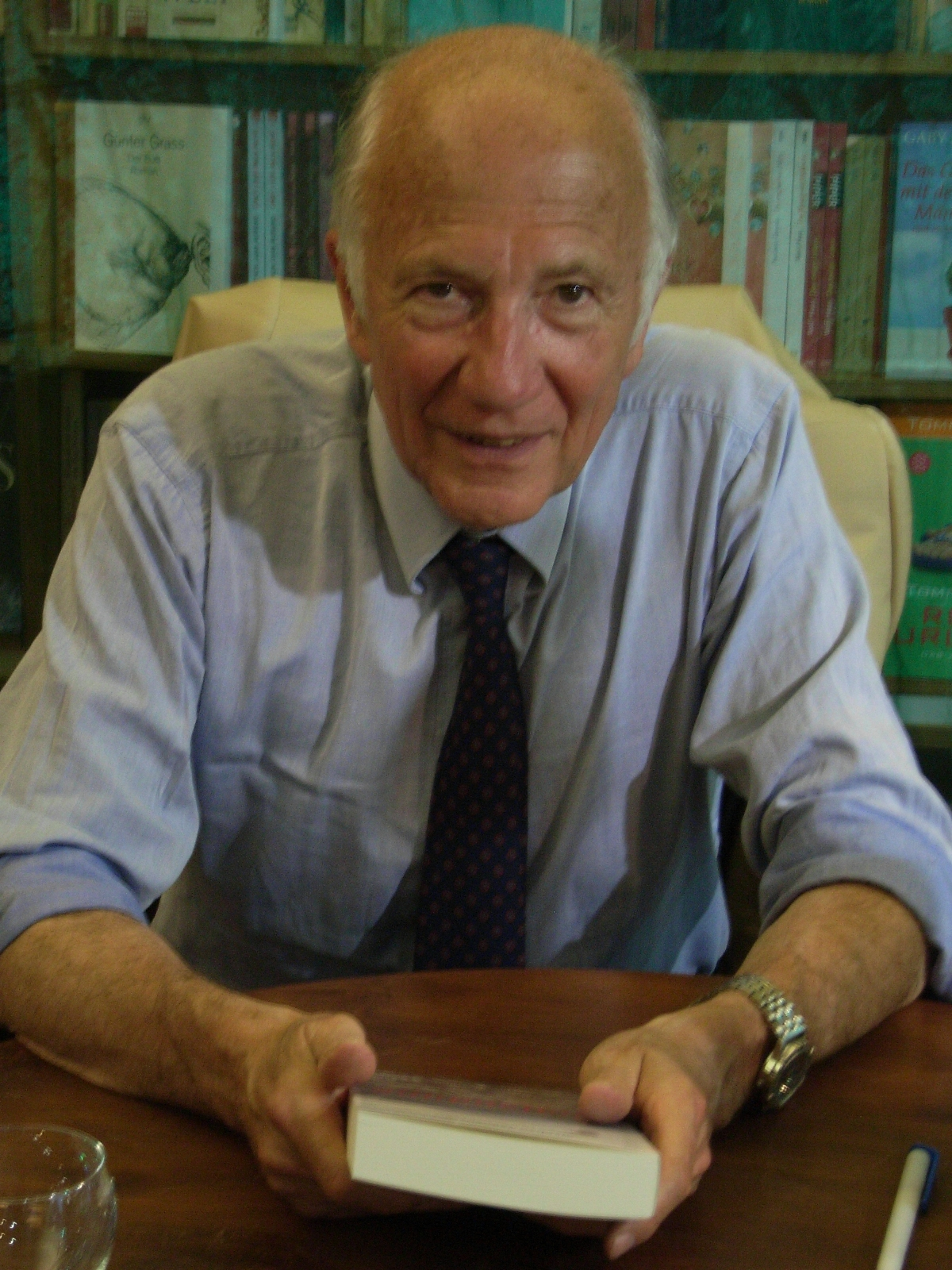 Stephan Tanneberger (* 1935), deutscher Onkologe und ehemaliger Direktor des Zentralinstituts für Krebsforschung der Akademie der Wissenschaften der DDR (1975-1990), im Juni 2010 bei einer Buchlesung